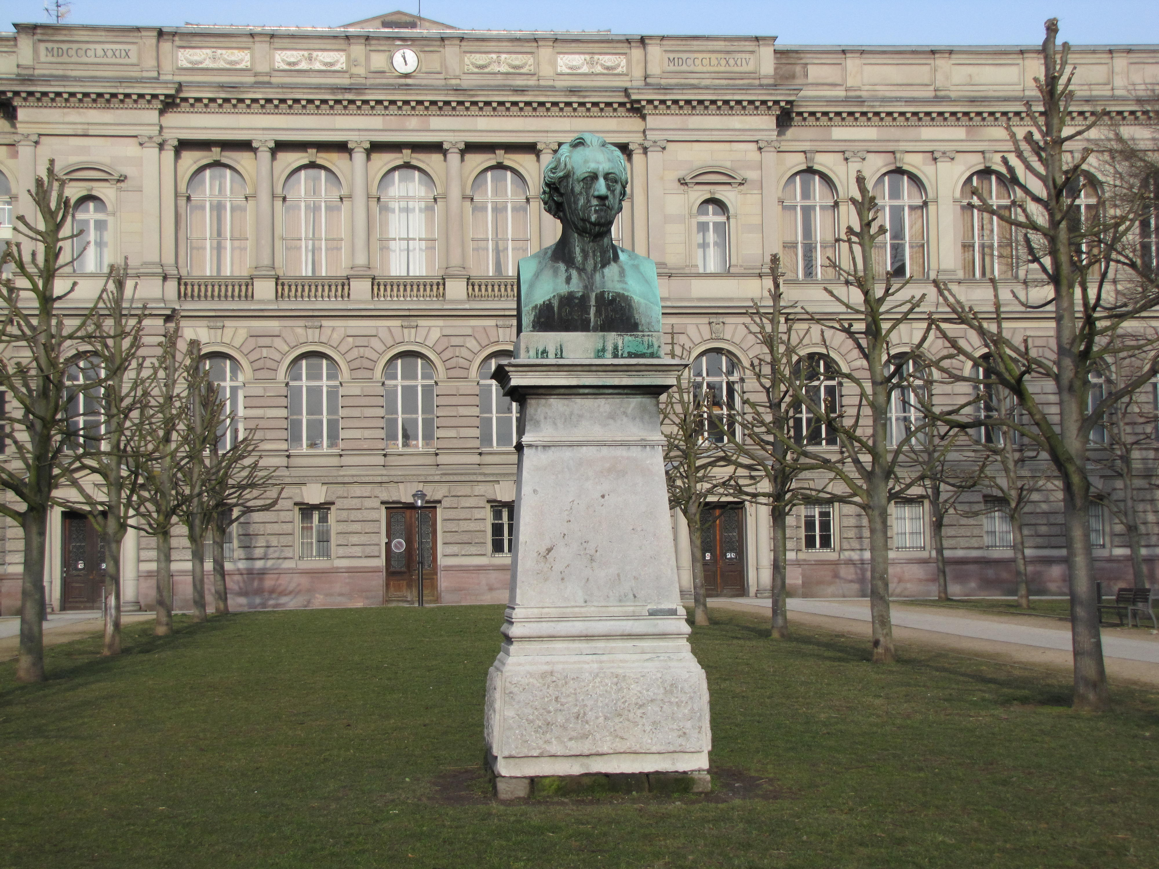 Alsace, Bas-Rhin, Strasbourg, Palais universitaire (XIXe), 9 place d'Université. This building is en partie classé, en partie inscrit au titre des Monuments Historiques. .